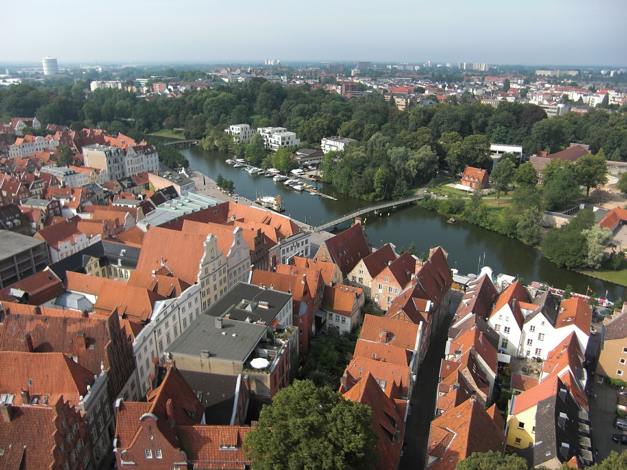 Lübeck Panorama Obertrave Blick von St. Petri Aussichtsturm